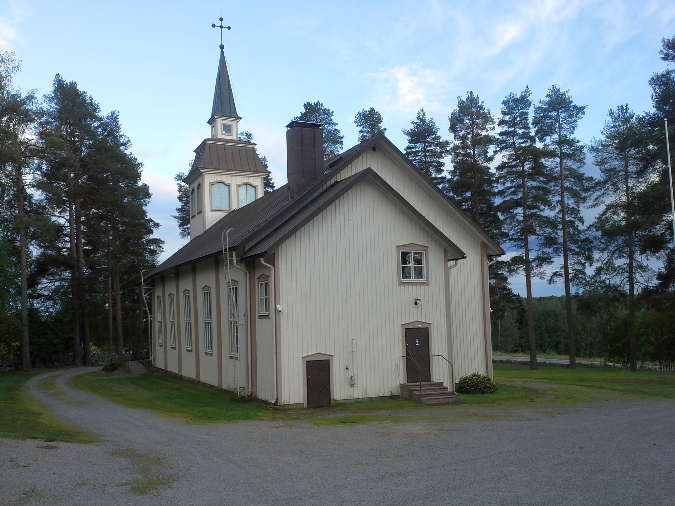 Koskuen kirkko sakastin päädystä päin kuvattuna